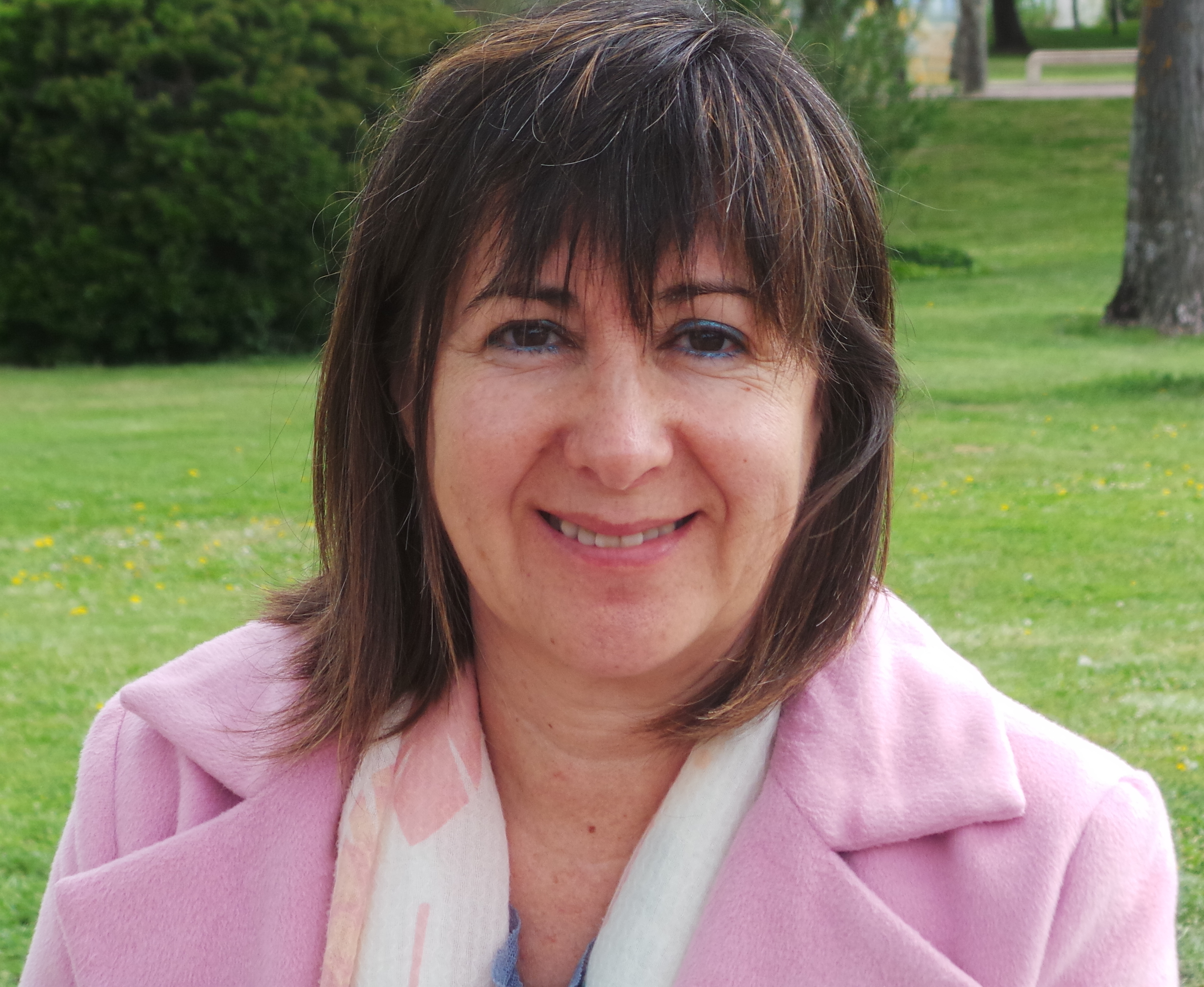 Ana de Miguel en el Campus de la Universidad Autónoma de Madrid